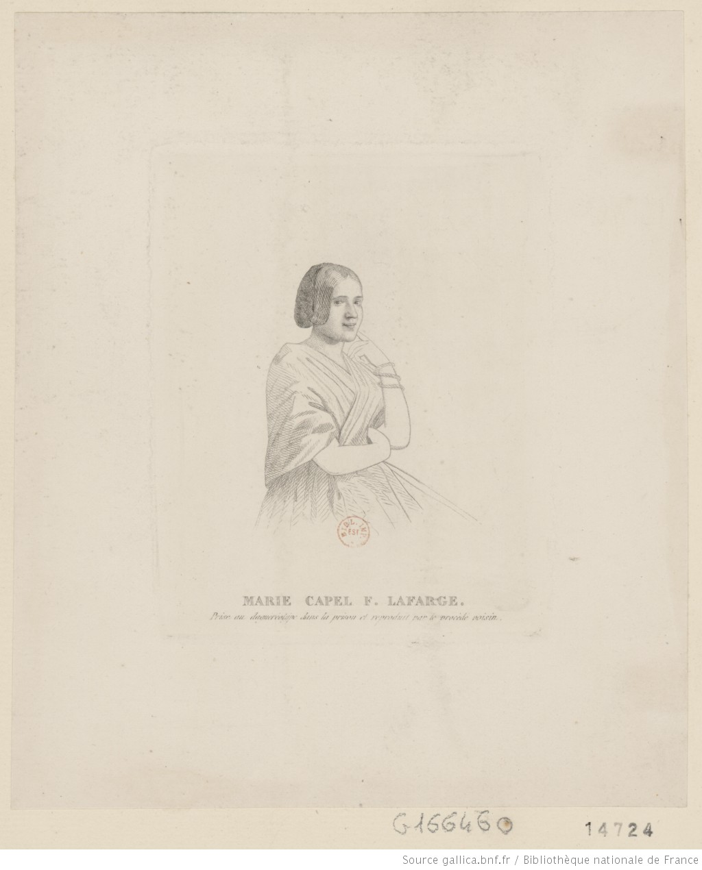 Portrait de Marie Capelle (XIXème siècle)